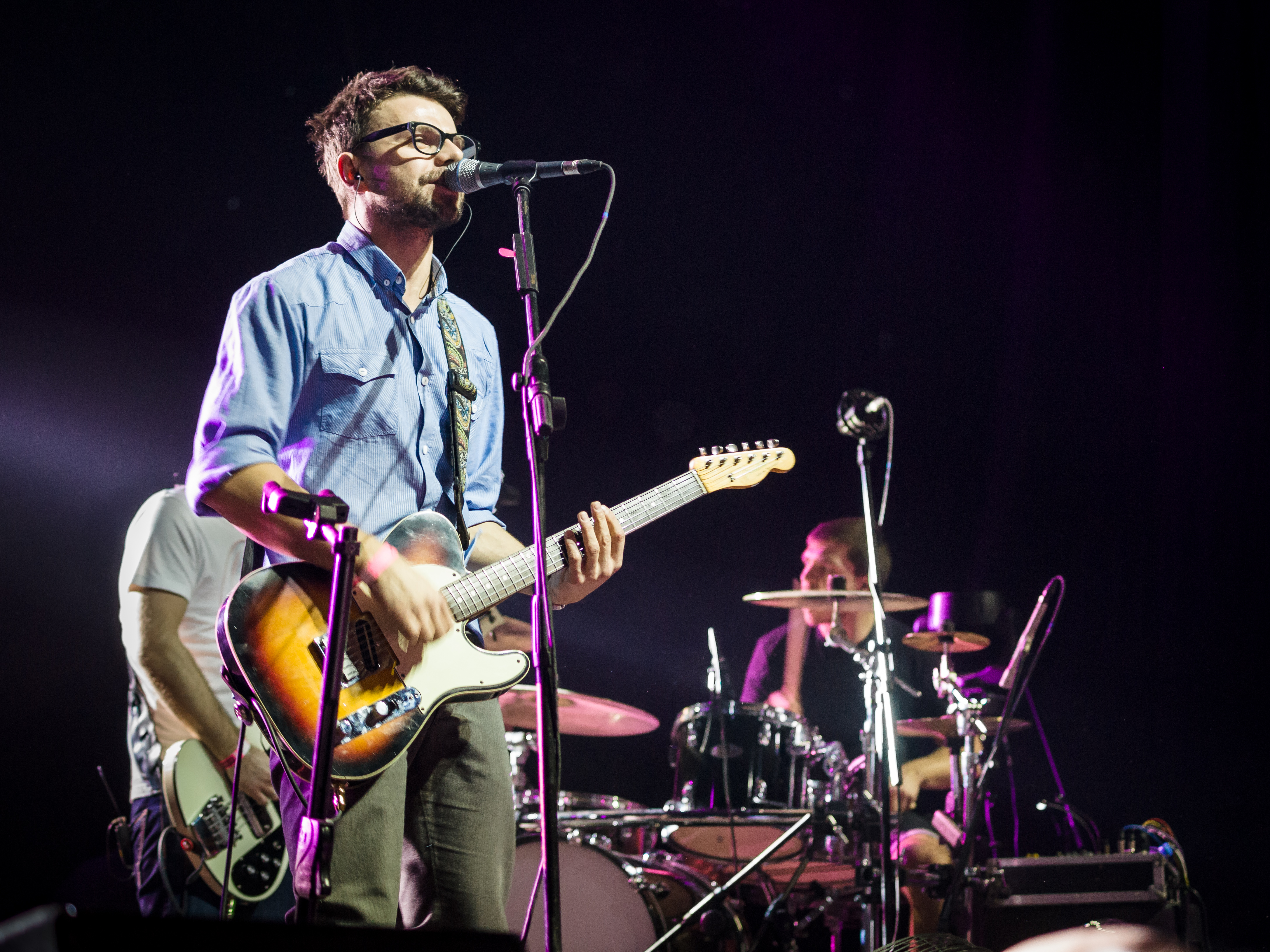 Jakub Kawalec "Quka", wokalista zespołu happysad podczas Rocket Festiwal 2013 w Warszawie.